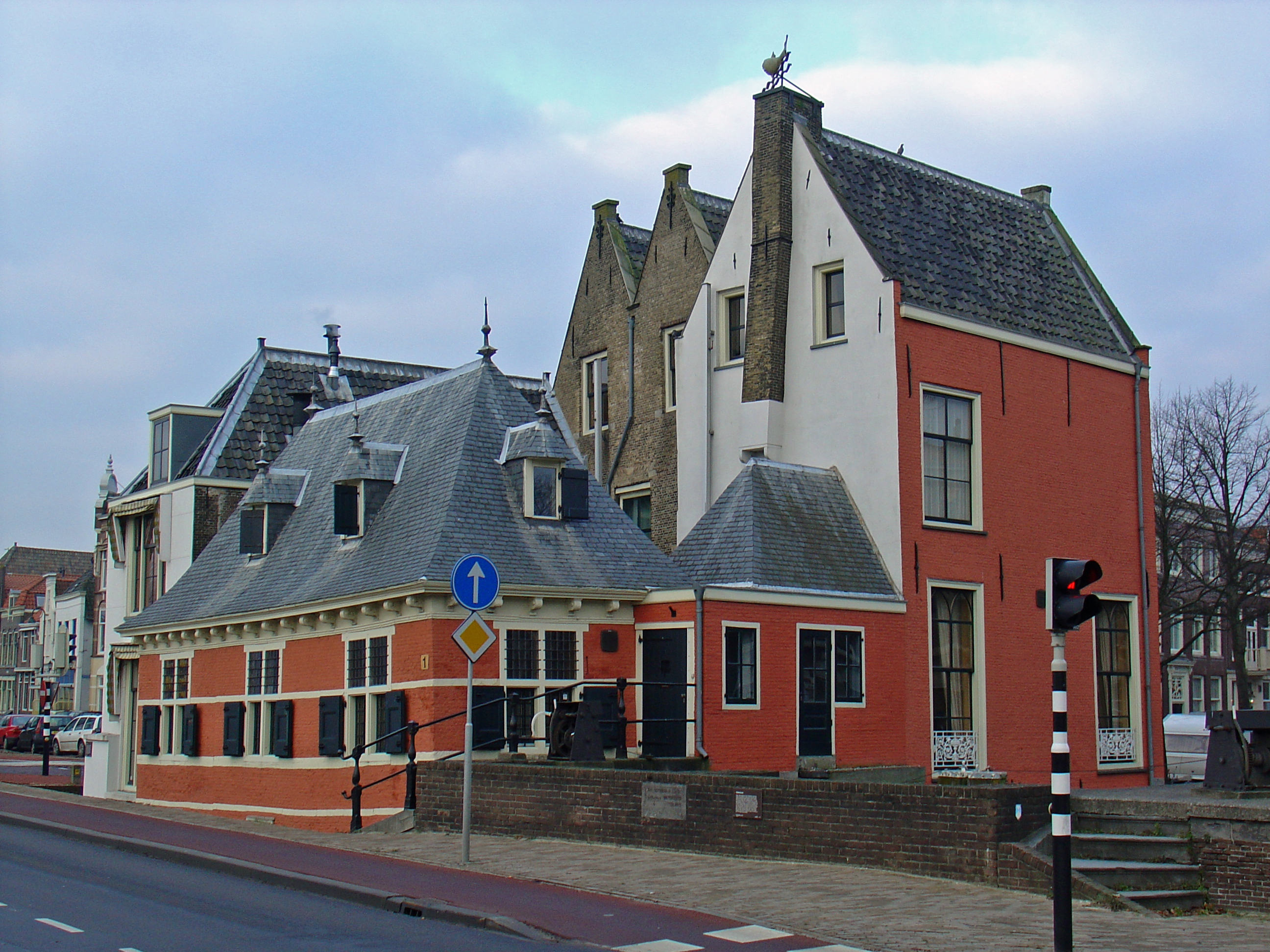 Tolhuis met sluiswachterswoning aan de Westhaven/ Nieuwe Veerstal te Gouda. foto Jan Lafeber 6 januari 2006